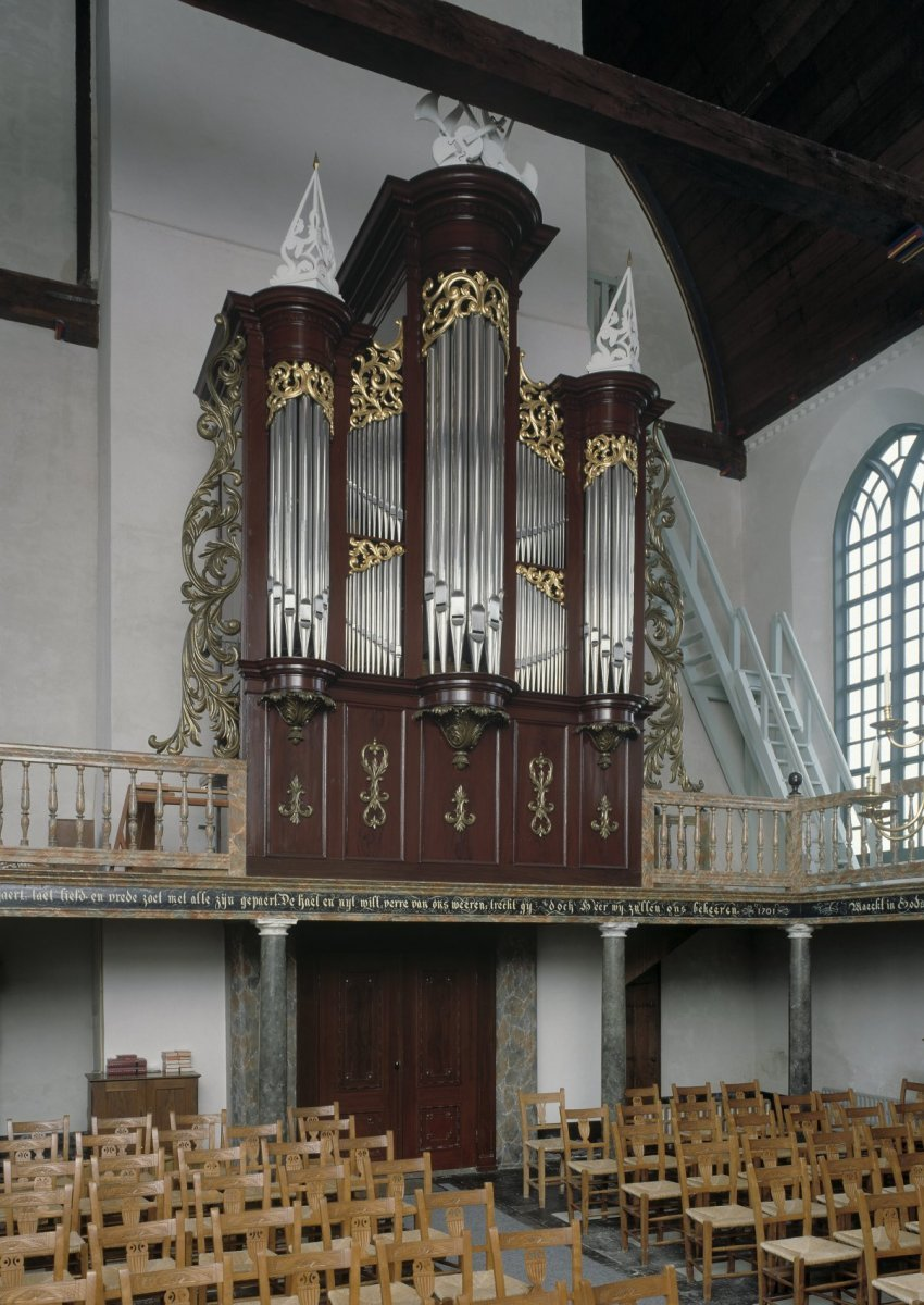 Nederlands Hervormde Kerk: Interieur, aanzicht orgel, orgelnummer 329 (opmerking: Gefotografeerd voor Het Historische Orgel in Nederland 1850-1858)